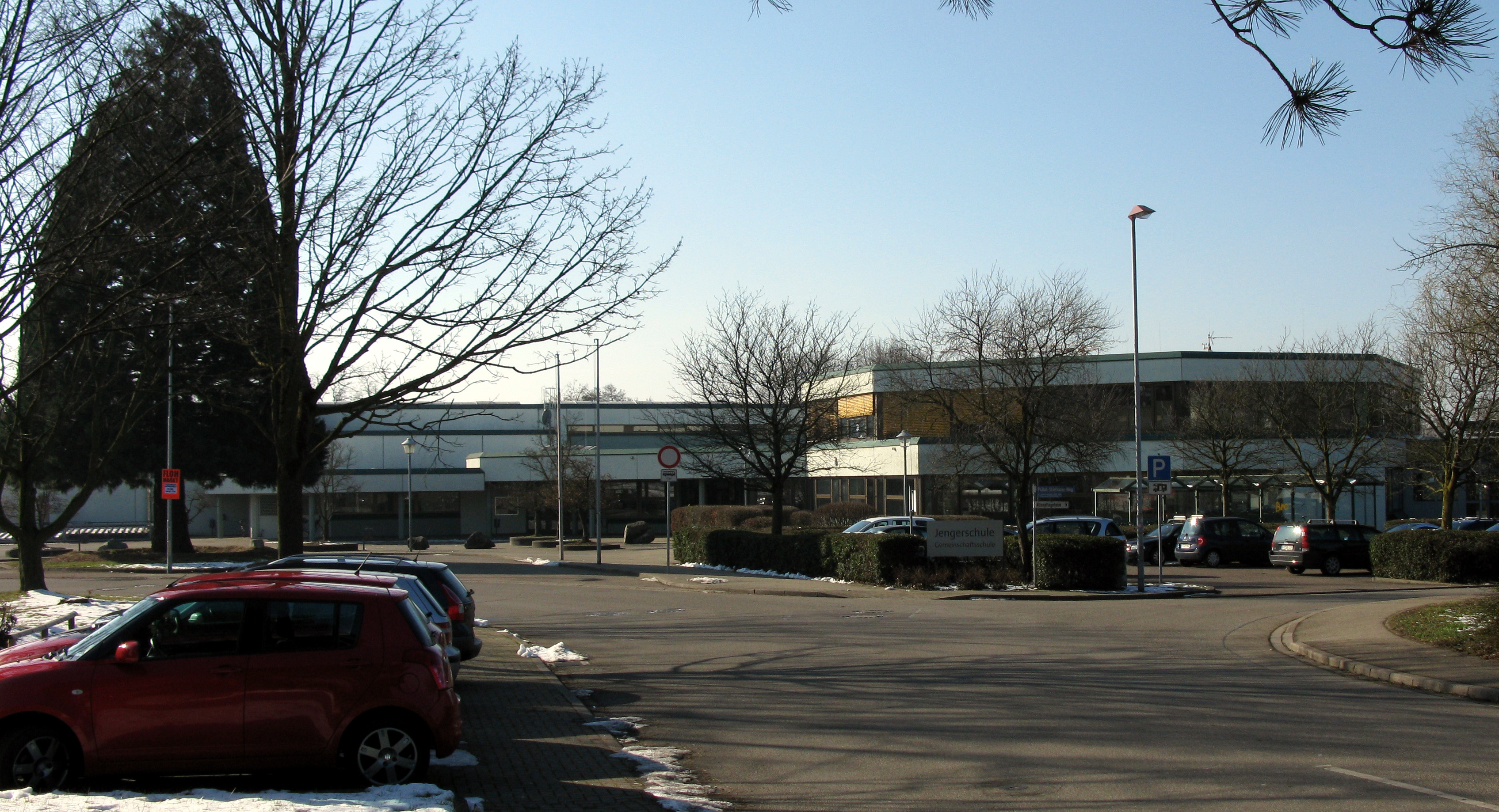 Jengerschule, Gemeinschaftsschule von Ehrenkirchen